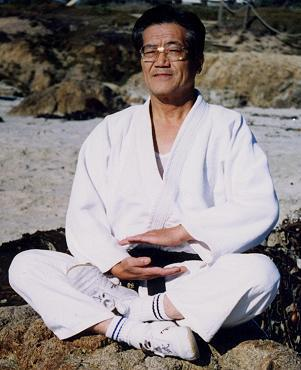 Ji Han-Jae pratiquant les techniques de méditation du Samrangdo, qu'il a pu perfectionner lors de son emprisonnement